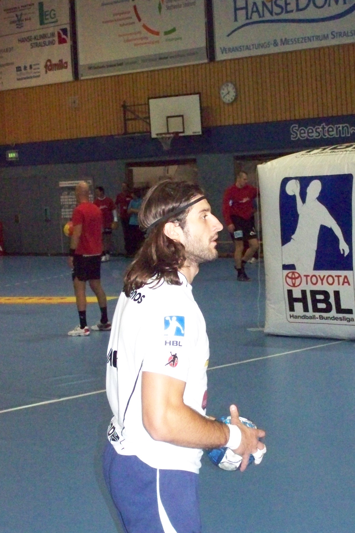 Spyros Balomenos, griechischer Handballspieler des HBW Balingen-Weilstetten, beim Spiel in der ersten Handball-Bundesliga am 30.09.2008 in der Vogelsanghalle beim Stralsunder HV.